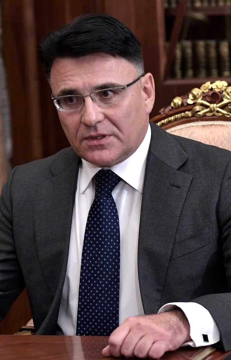 Руководитель Федеральной службы по надзору в сфере связи, информационных технологий и массовых коммуникаций Александр Жаров во время встречи с Президентом России Владимиром Путиным